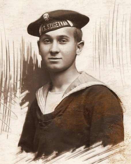 František Lněnička, námořník rakousko-uherského válečného námořnictva